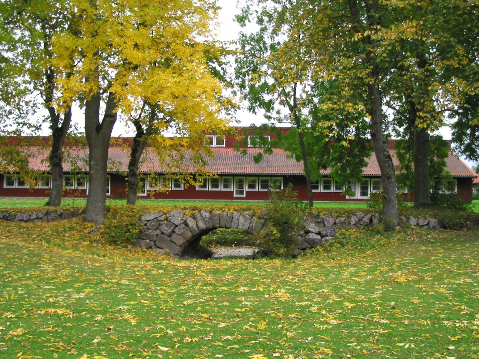 Valla folkhögskola i Linköping i Sverige. Valla Folk High School in Linköping, Sweden.